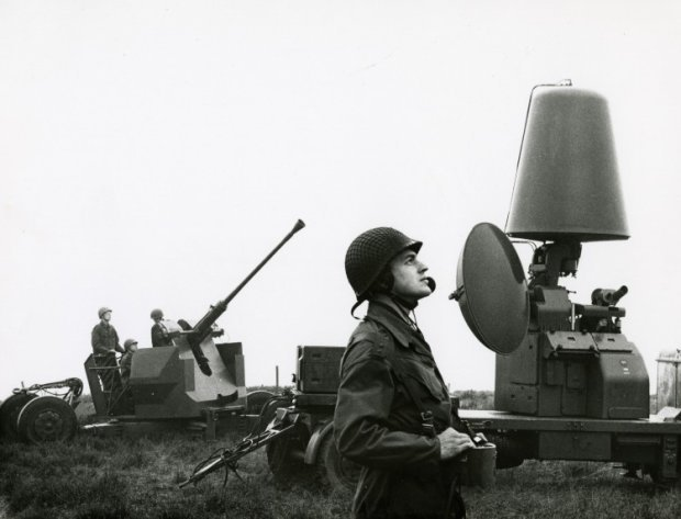 Luchtdoelartilleristen oefenen met het 40 lang 70 luchtdoelgeschut en het bijbehorende radar HSA L4/5.